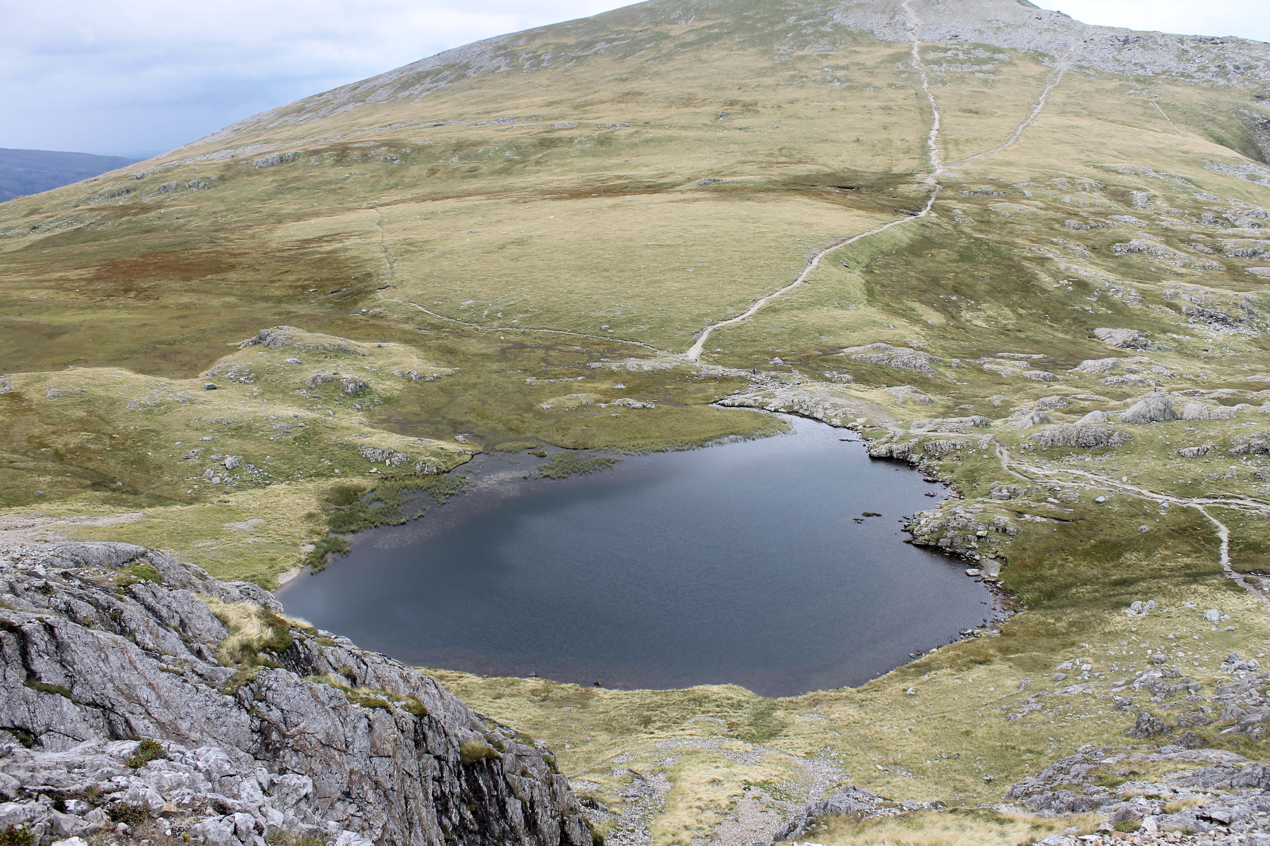 Llyn y Cŵn